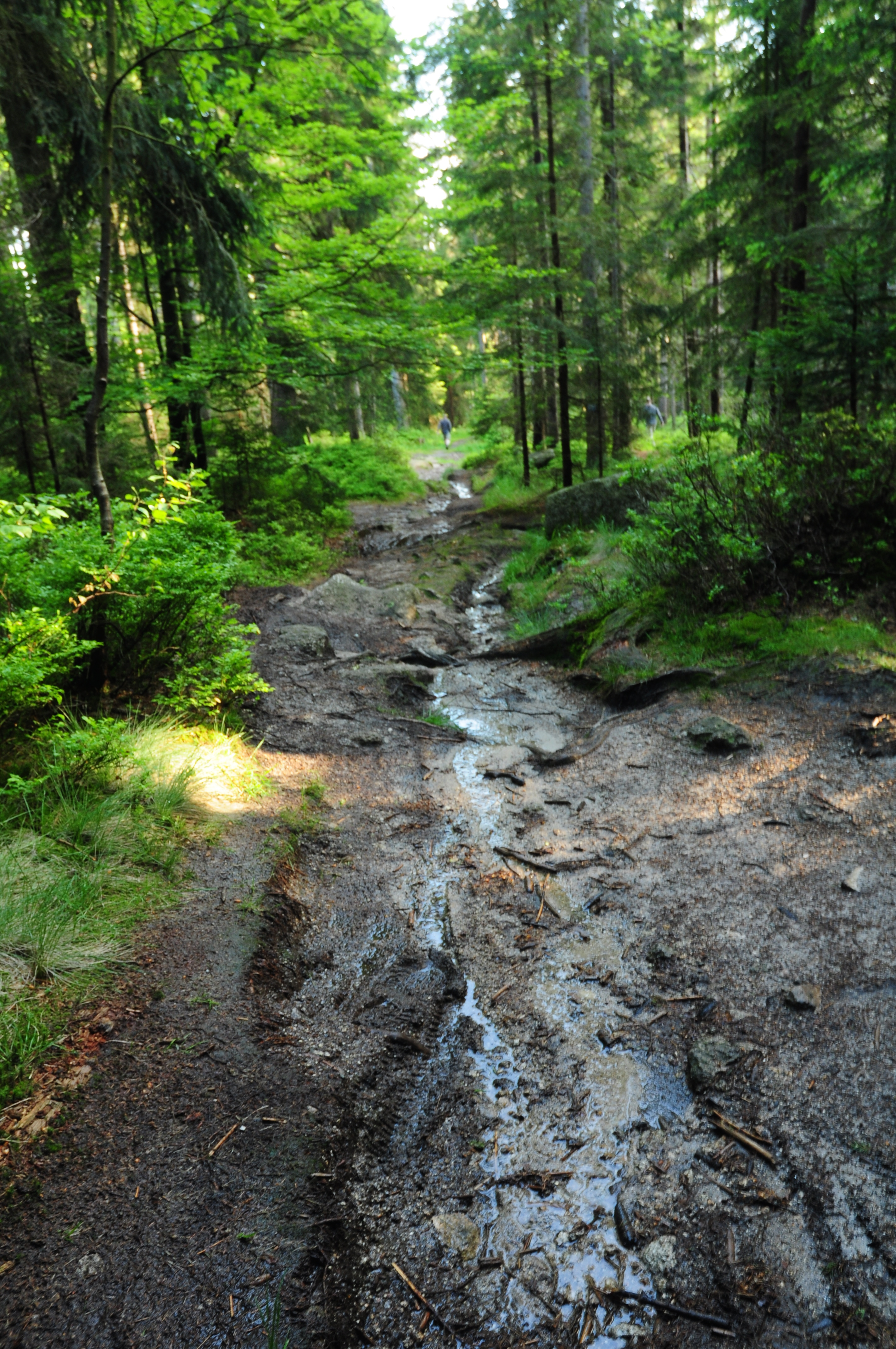 Naturwaldreservat Fichtelseemoor (NSG 00155.01), nach stundenlangem Regen läuft das Wasser über alle Wege, Fichtelgebirge